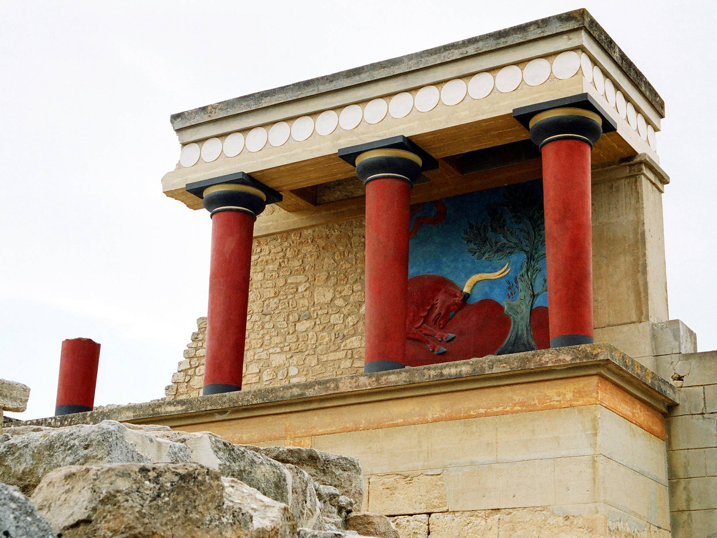 Knossos südlich von Iraklio, Kreta, Griechenland